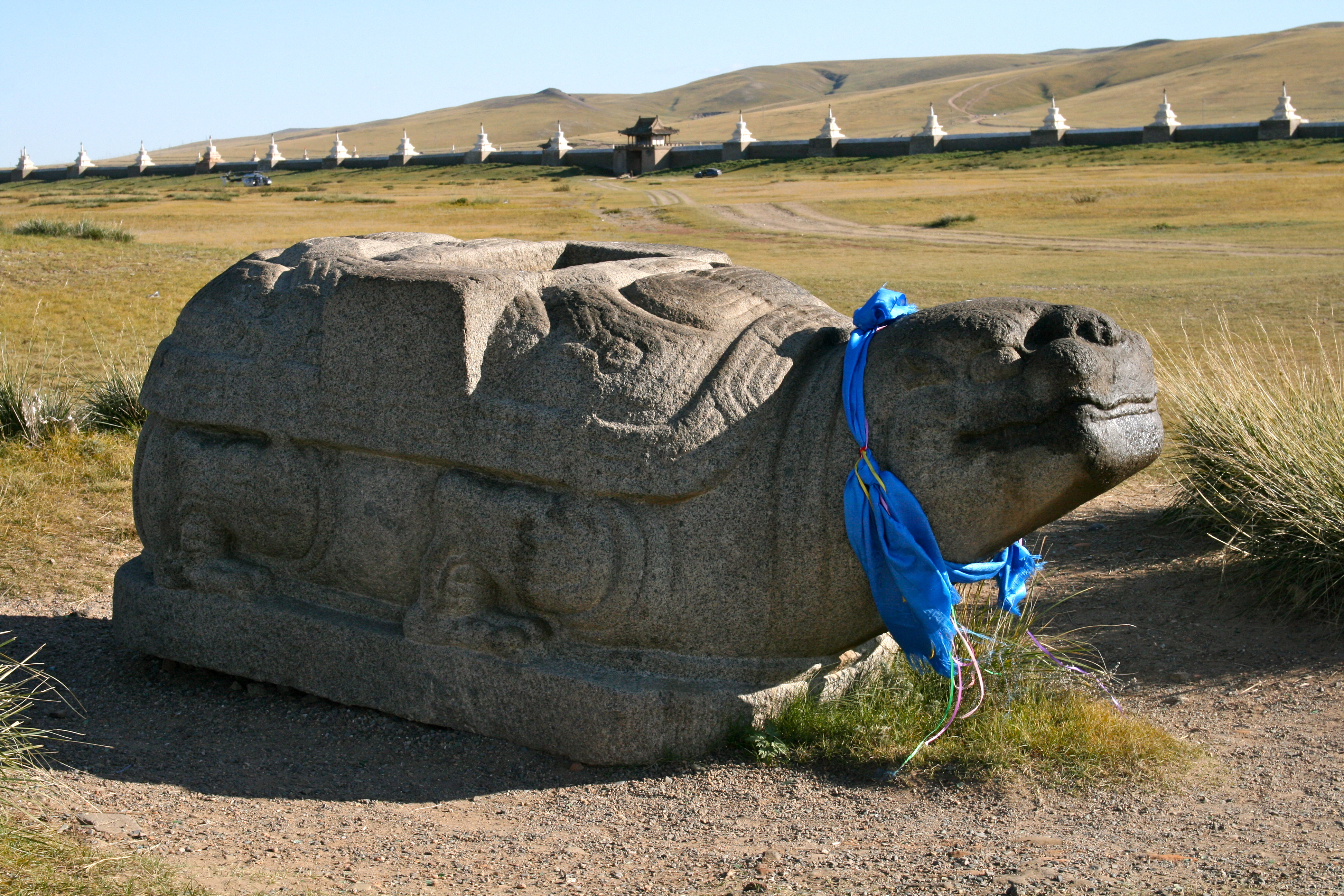 Protecting Turtle, Erdene Zuu Monastery